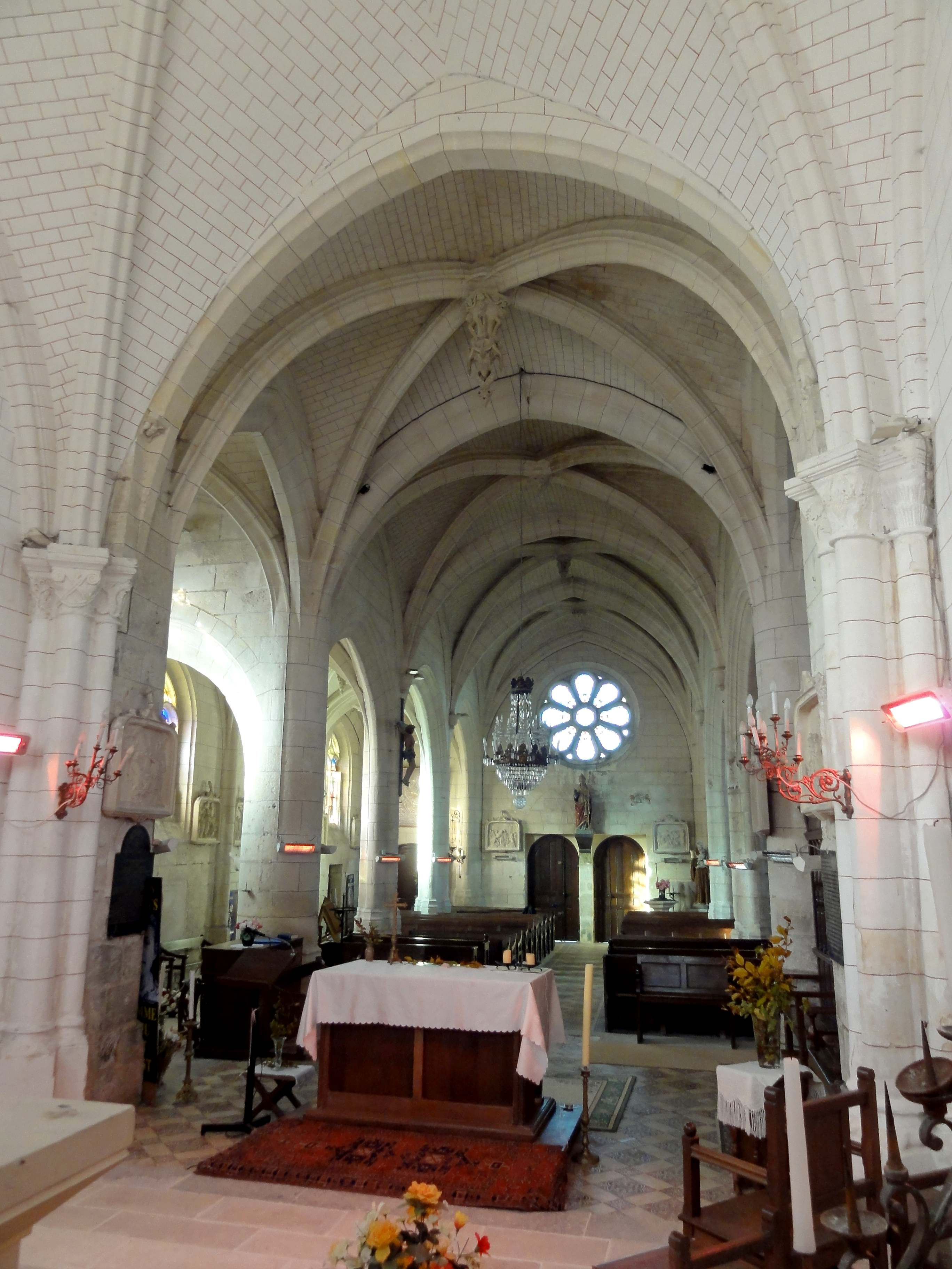 Abside, vue vers l'ouest.